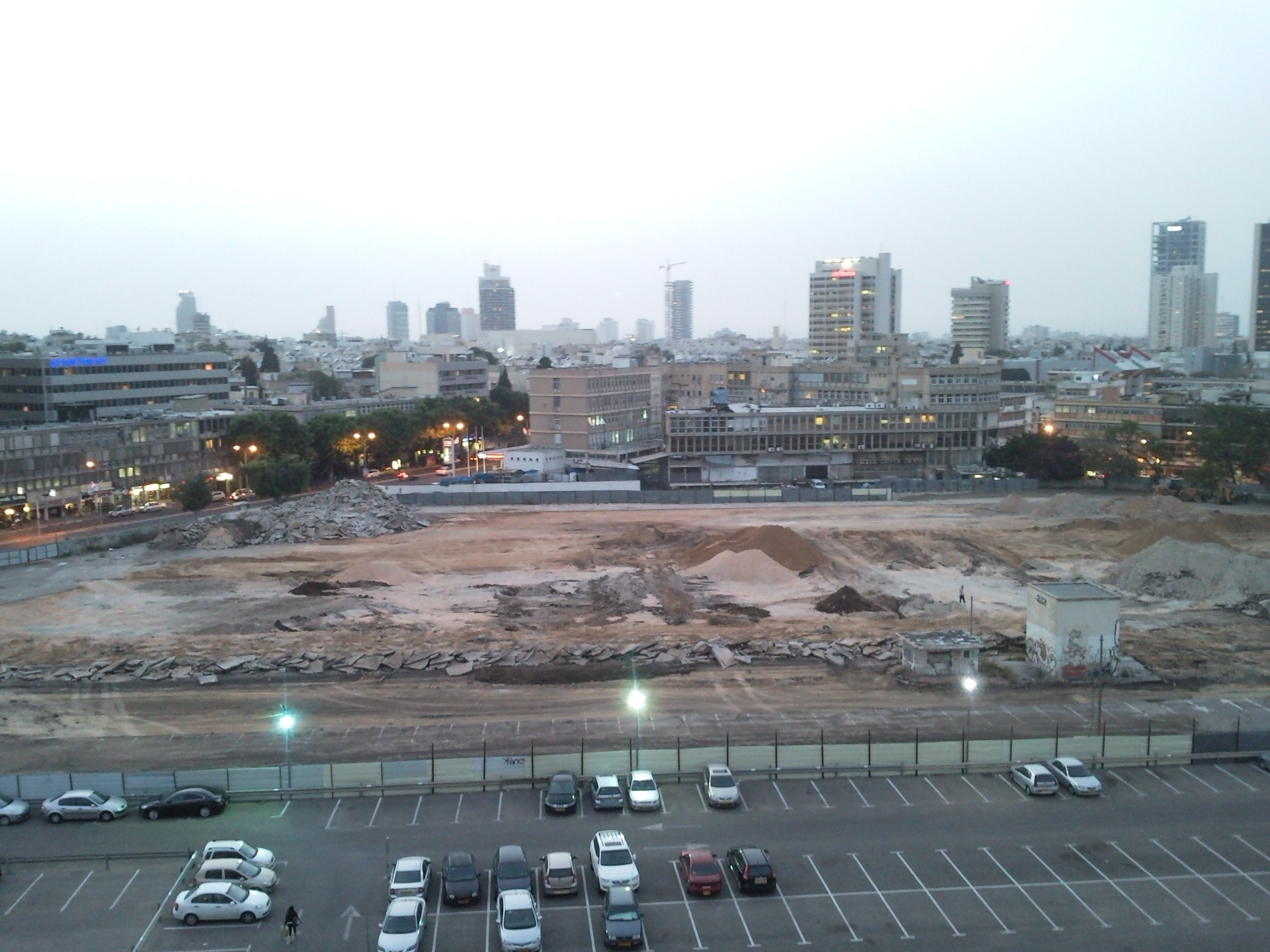 השוק הסיטונאי בתל אביב